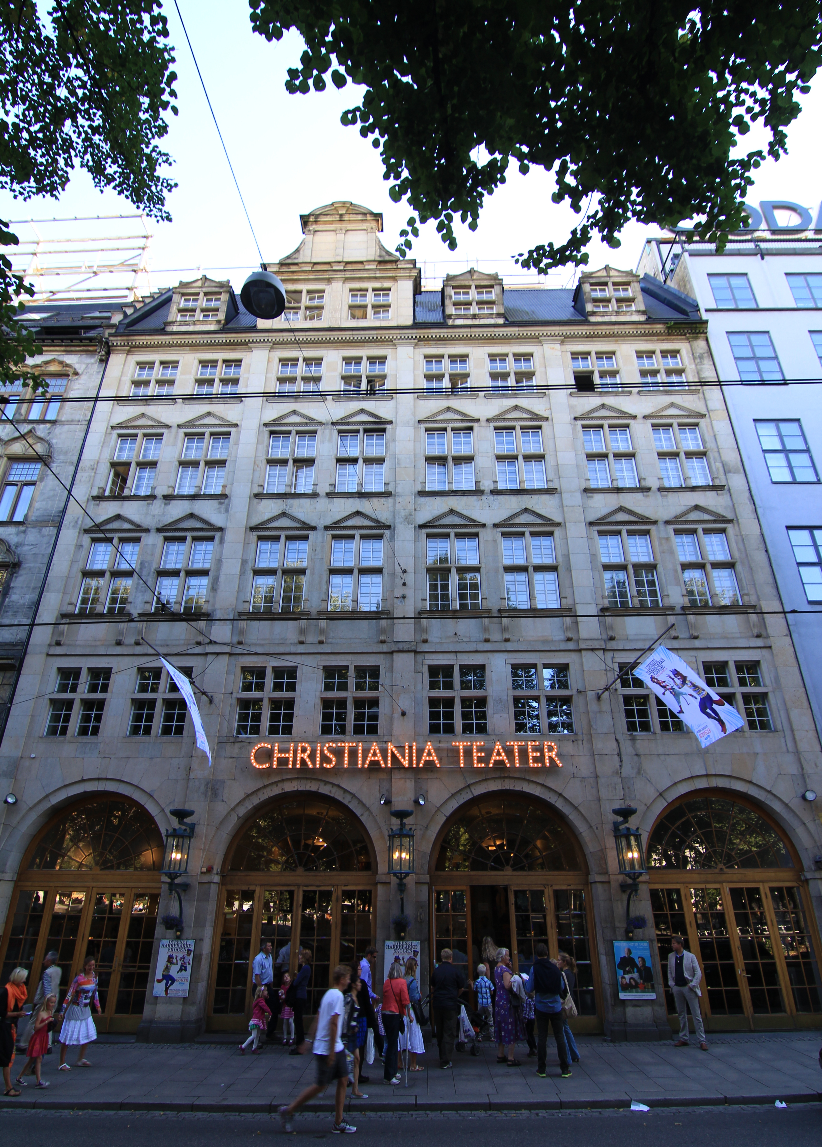 Filmteatret - Stortingsgata 16, Oslo